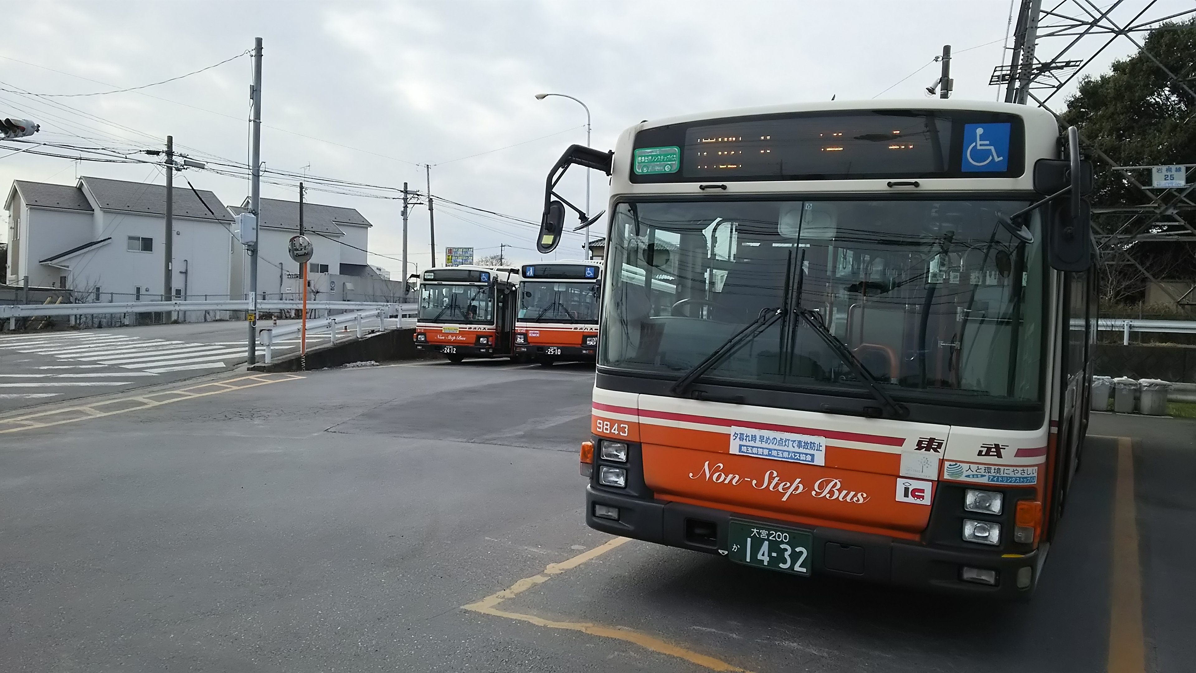 東武バスウエスト 岩槻営業所所属のバス。宮下バス停で撮影。